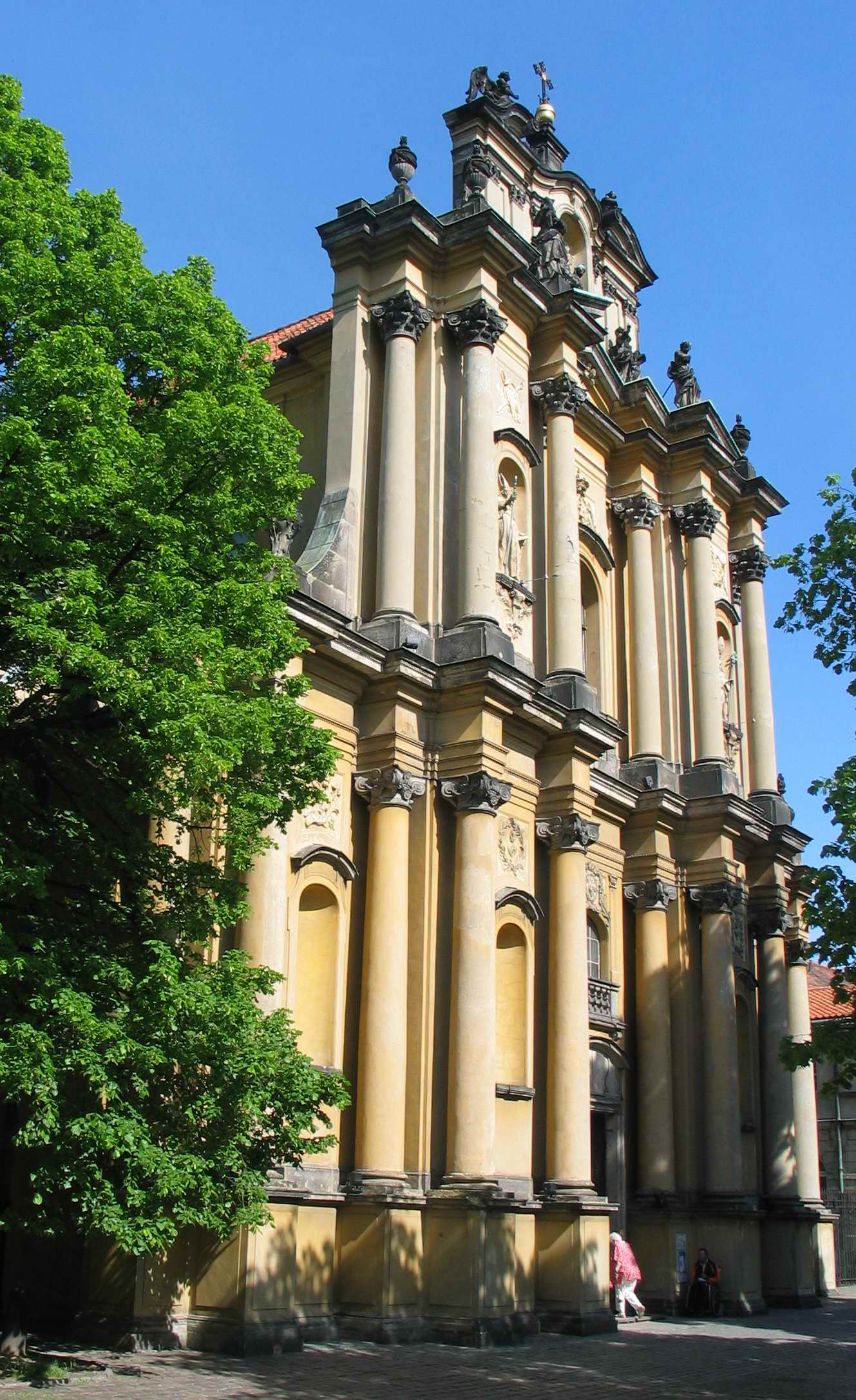 Kościół Wizytek w Warszawie